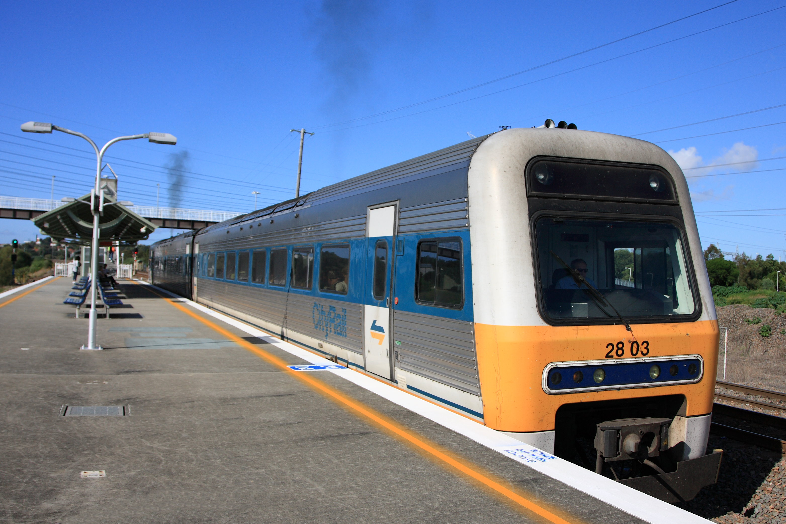 Endeavour set 2803 departs Warabrook station.